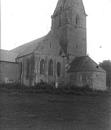 Eglise Saint-Georges d'Yvetot-Bocage : Chevet et clocher côté sud-est, Philippe Des Forts. N° phototype (NUMP) : DSF 1721 P - Négatif noir et blanc ; gélatino-bromure; support verre